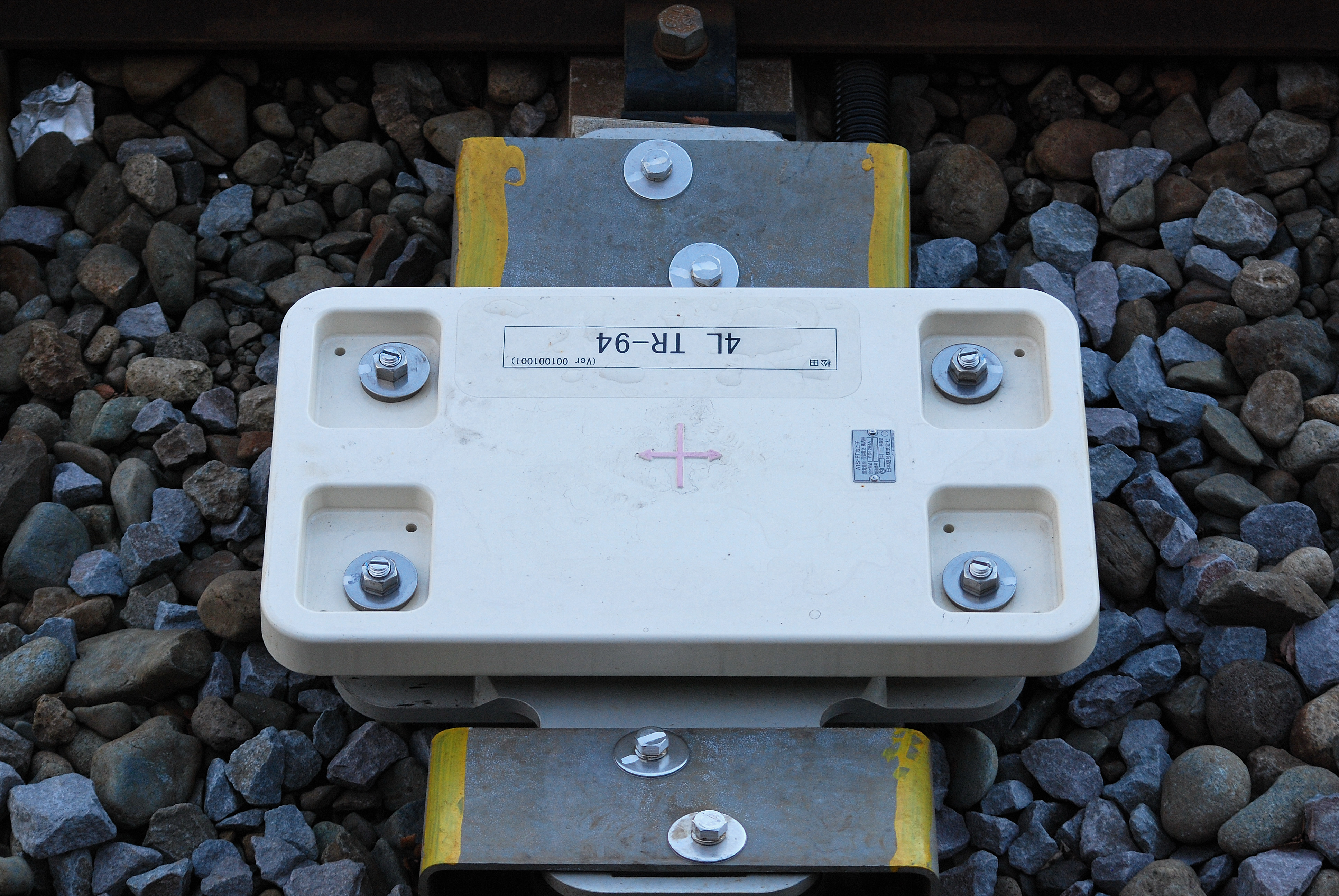 ATS-PT地上子（ホームから撮影）